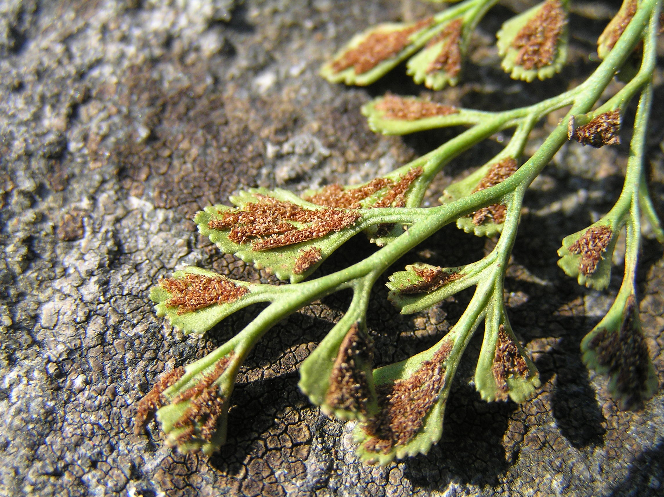 Aspelnium ruta-muraria, Choceň, Czech Republic